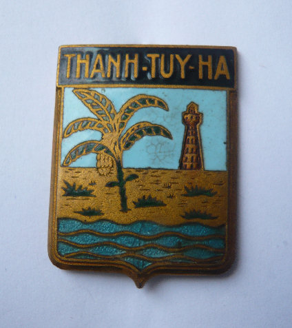 Insigne de l'Etablissement de réserve générale de munitions situé à THANH-TUY-HA près de Bien-Hoa dans le sud vietnam. Rattaché aux FAVN.